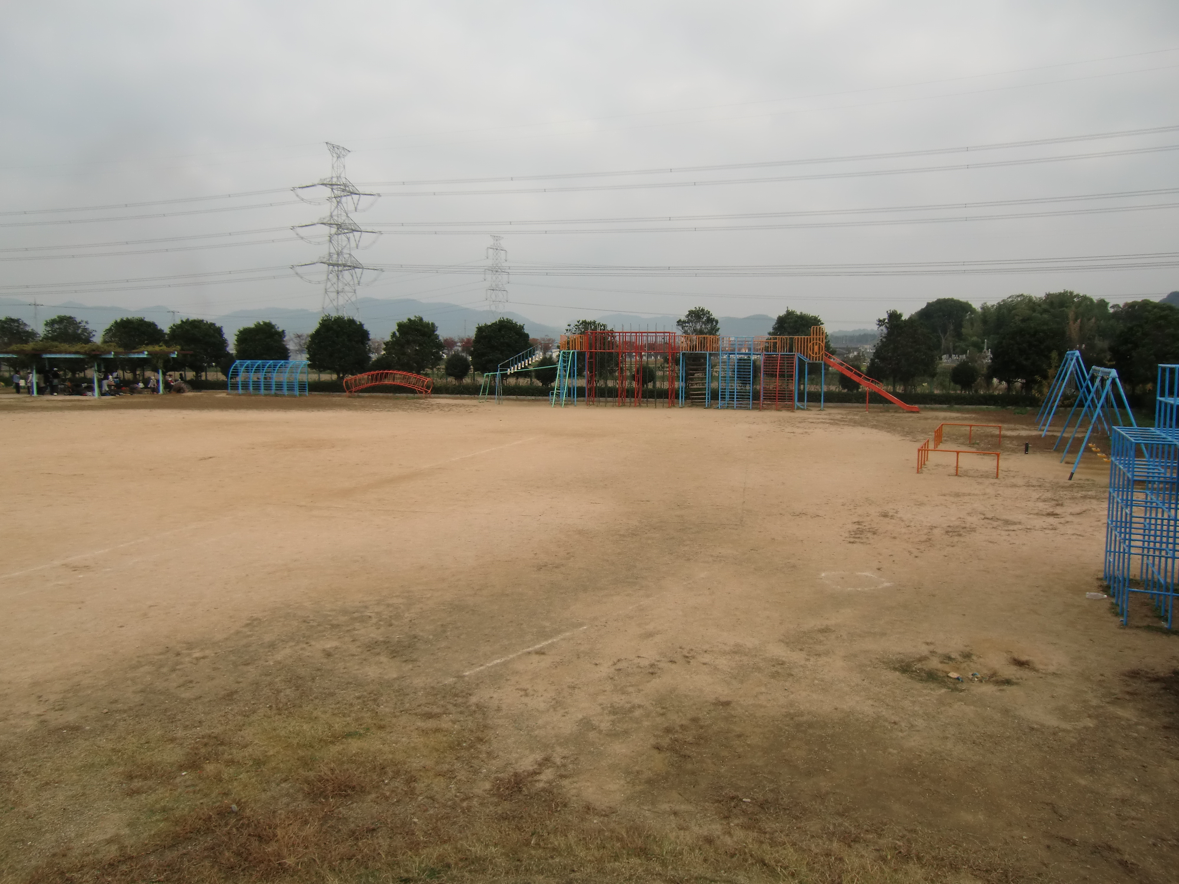 西神吉小学校に設置されている遊具・レインボー80、現在は撤去済み